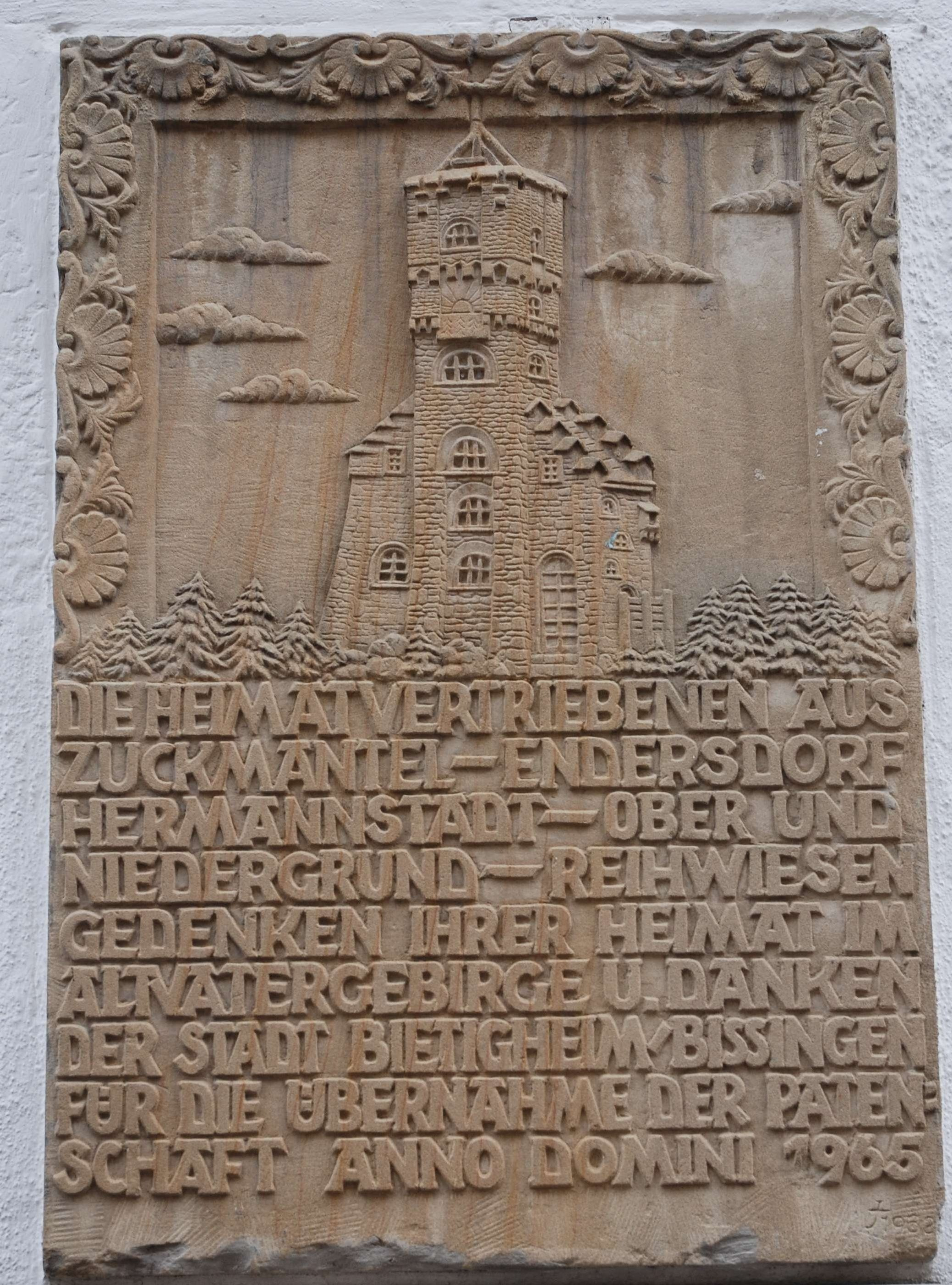 Gedenktafel der Heimatvertriebenen aus Zuckmantl in Bietigheim-Bissingen